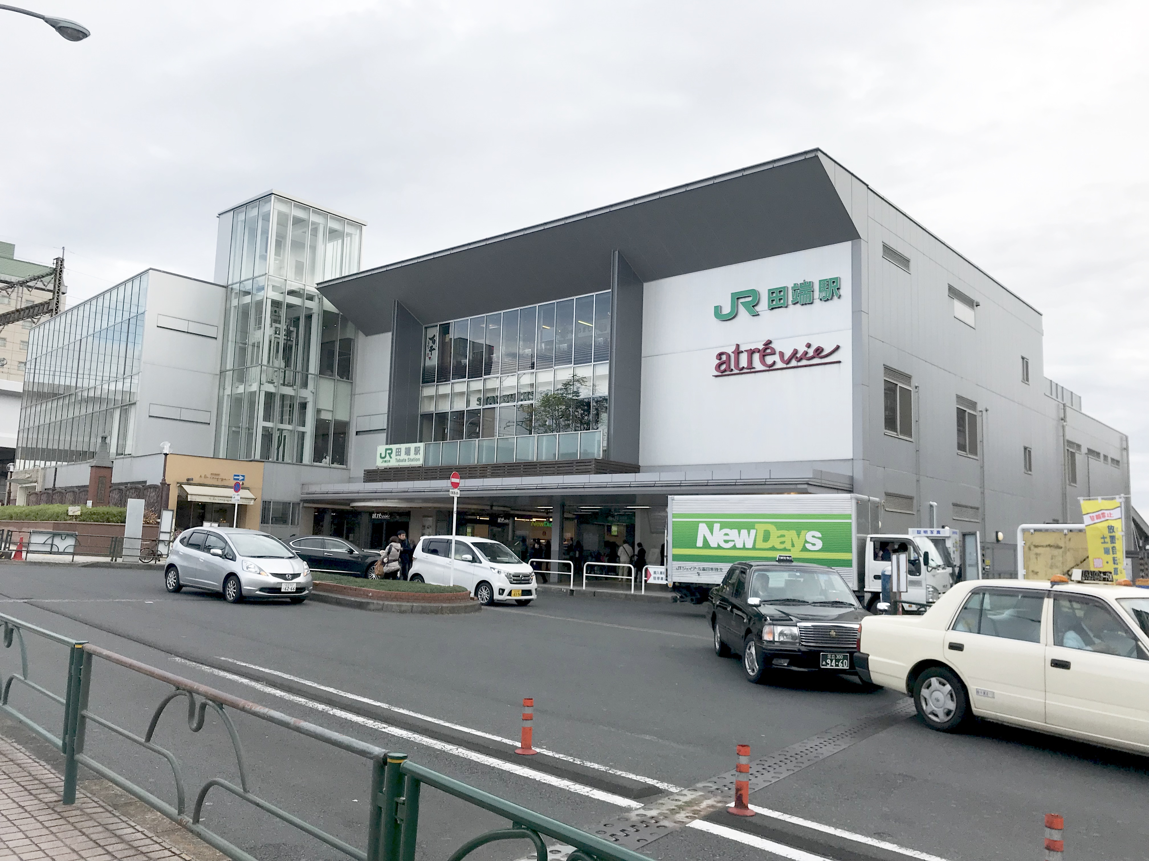 JR東日本山手線・京浜東北線田端駅北口駅舎